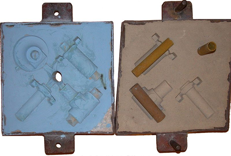 Les meitats superiors i inferiors d'ub motlle de sorra